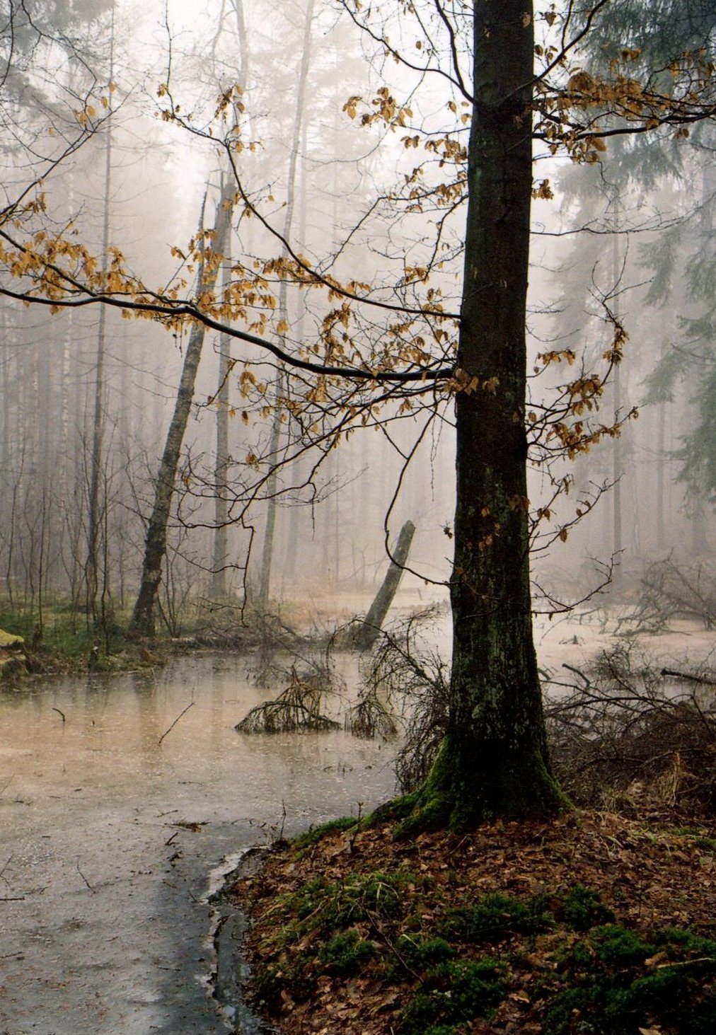 Autor: Adrian Grzegorz Rok wykonania: 2002